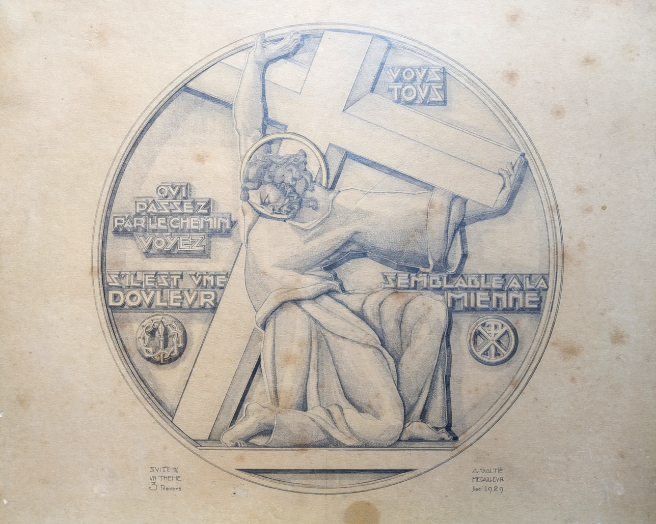 Andre Galtie medal design (1929) in pencil